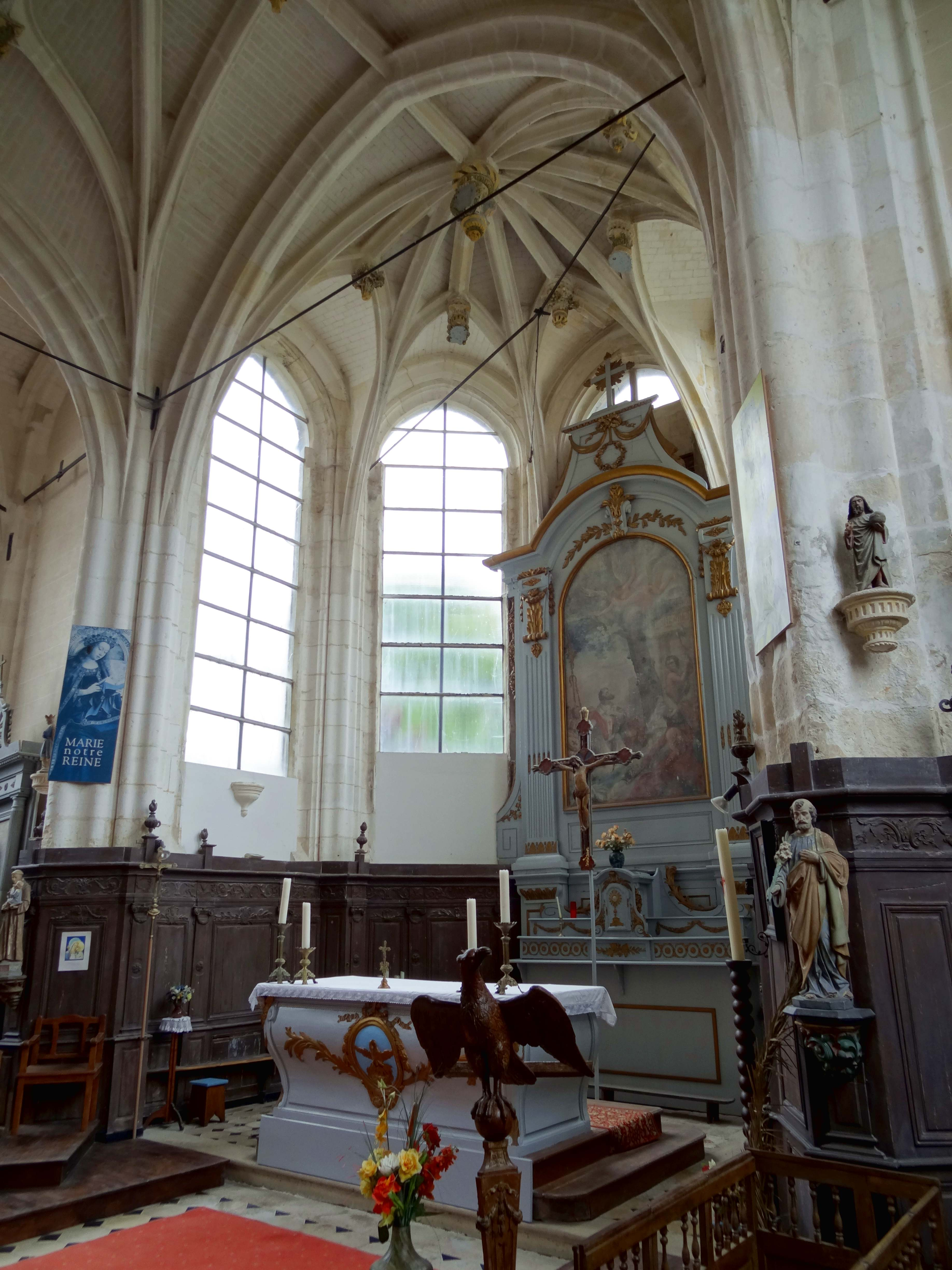 Intérieur de l'église - voir titre.